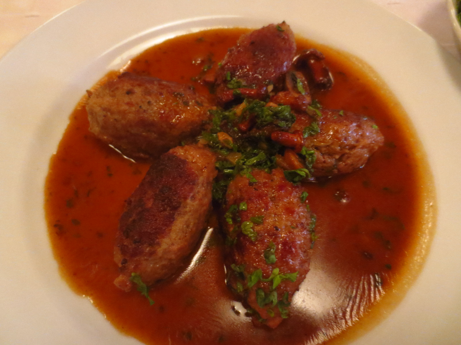 Quenelles de foie de la cuisine alasacienne